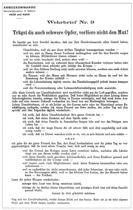 Heer und Haus Wehrbrief Nr. 9, Schweizer Armee